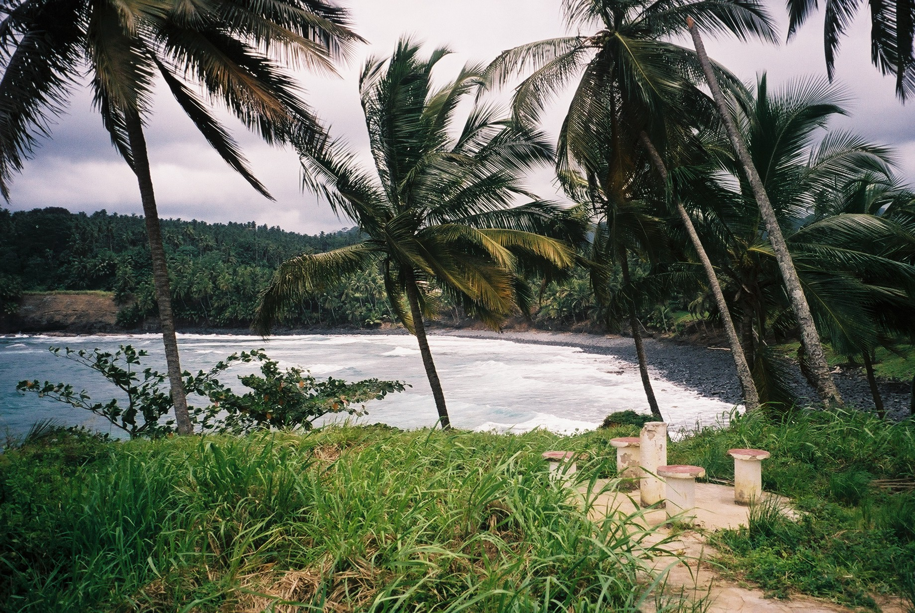 São Tomé e Principe - Praia